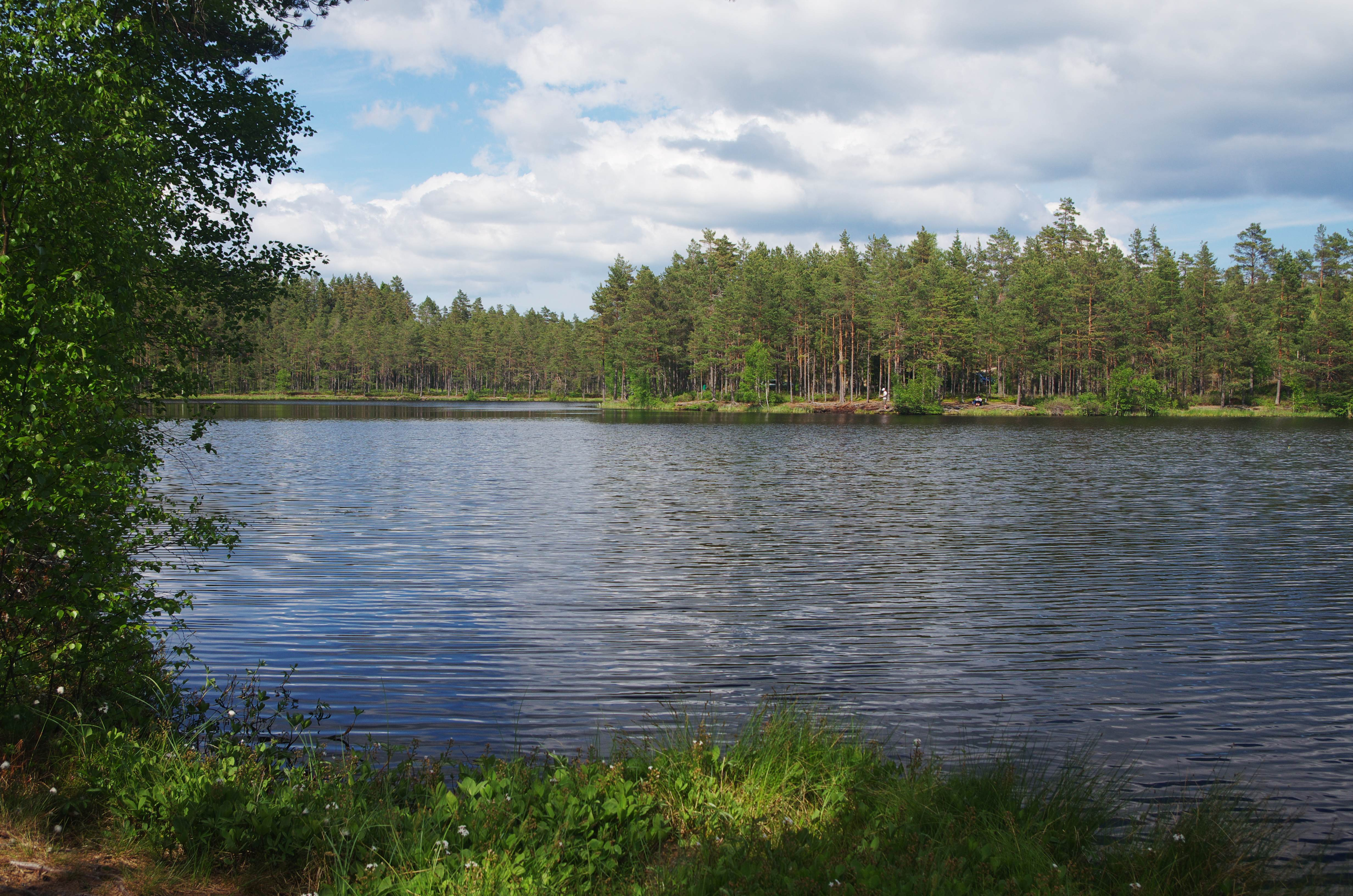 Skinnaregölen på Hökensås i Tidaholms kommun i Västergötland i Sverige.